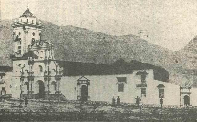 vista de la Plaza Mayor (hoy Plaza Bolivar) y la Catedral de Caracas en 1867